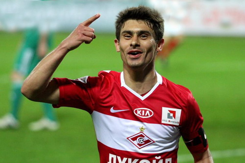 Alex Raphael Meschini